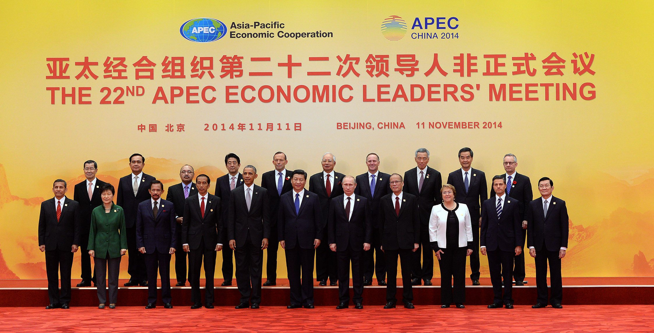 Gobierno de Chile